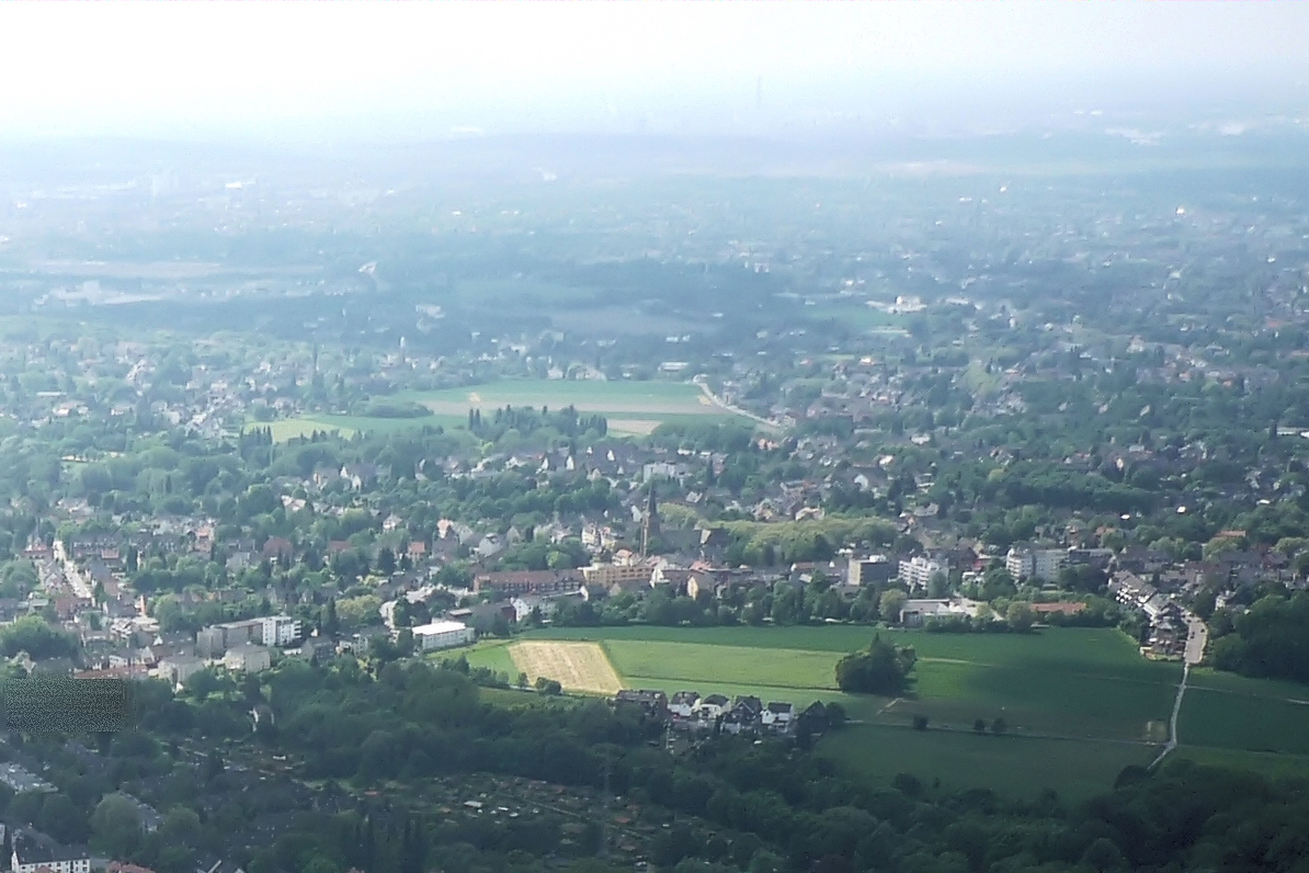 Essen-Frintrop, Blick von Norden